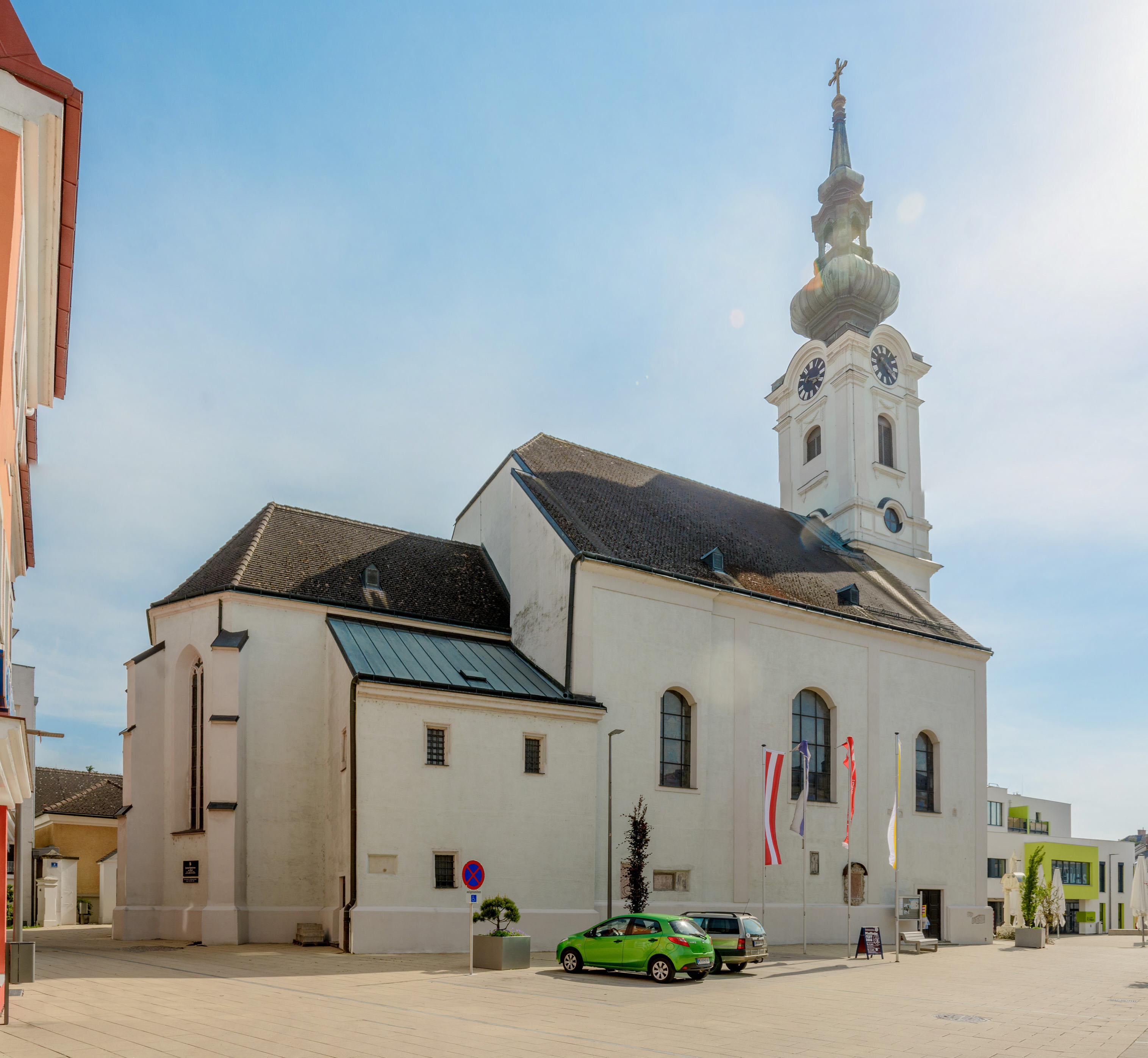 Kath. Pfarrkirche Mariae Himmelfahrt